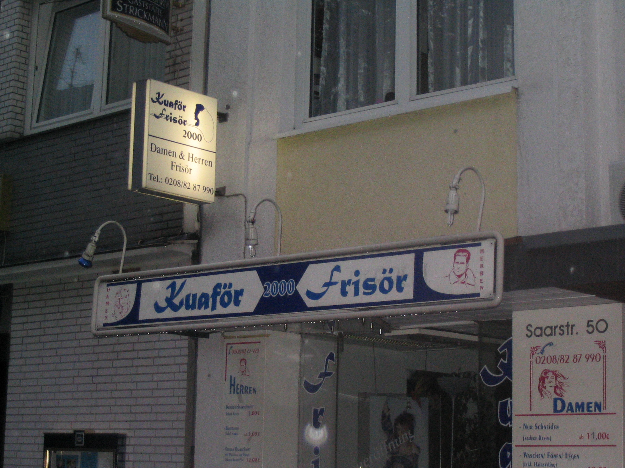 Kuaför